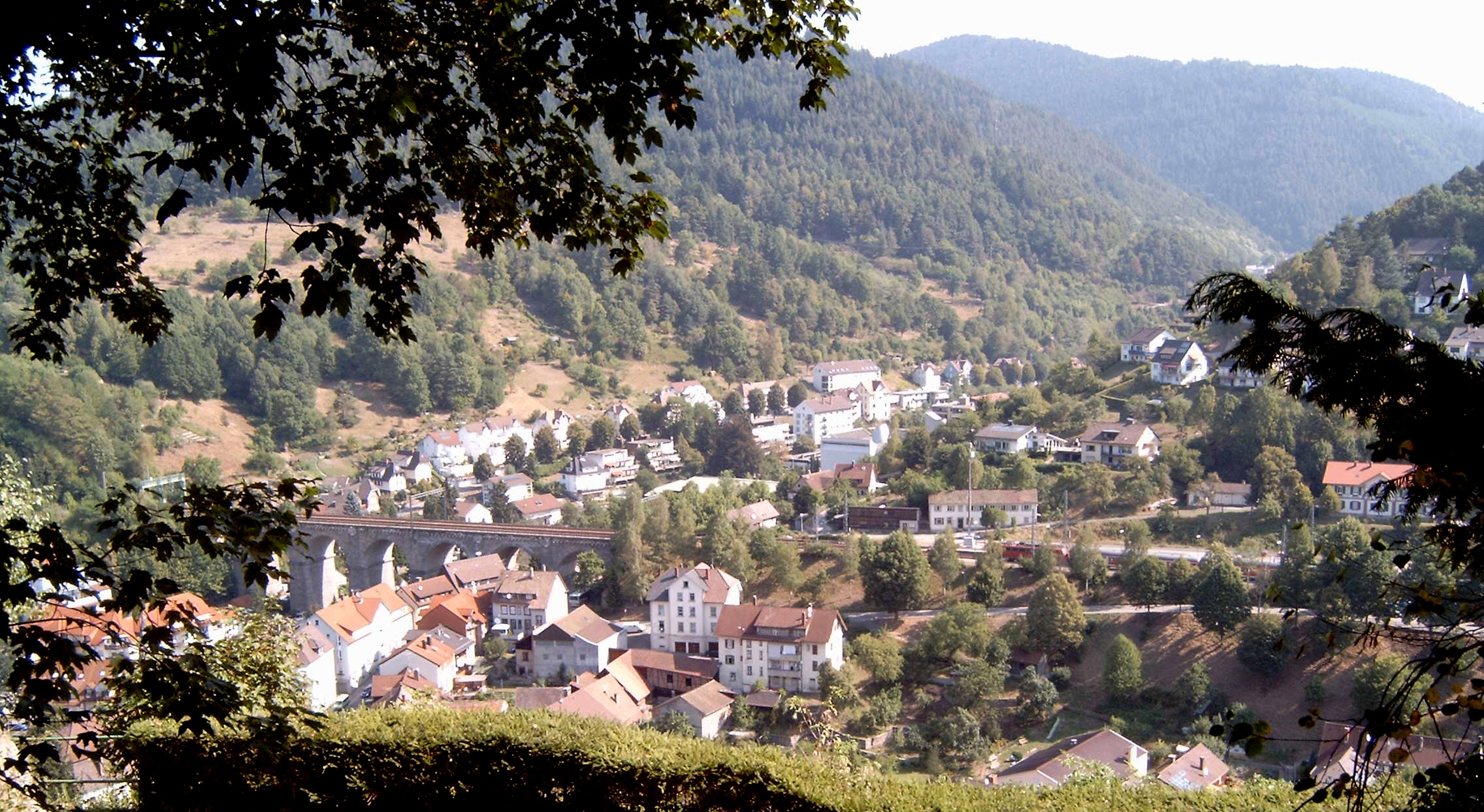 Beschreibung: Blick auf Hornberg vom Schloss, mit Eisenbahnviadukt Hornberg Quelle: selbst fotografiert am 10.8.2003 Fotograf / Zeichner: Prolineserver